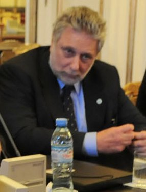 Mario Llambías. Confederaciones Rurales Argentinas. Carbap. en entrevista con el gobierno durante el paro patronal agropecuario de 2008. Argentina